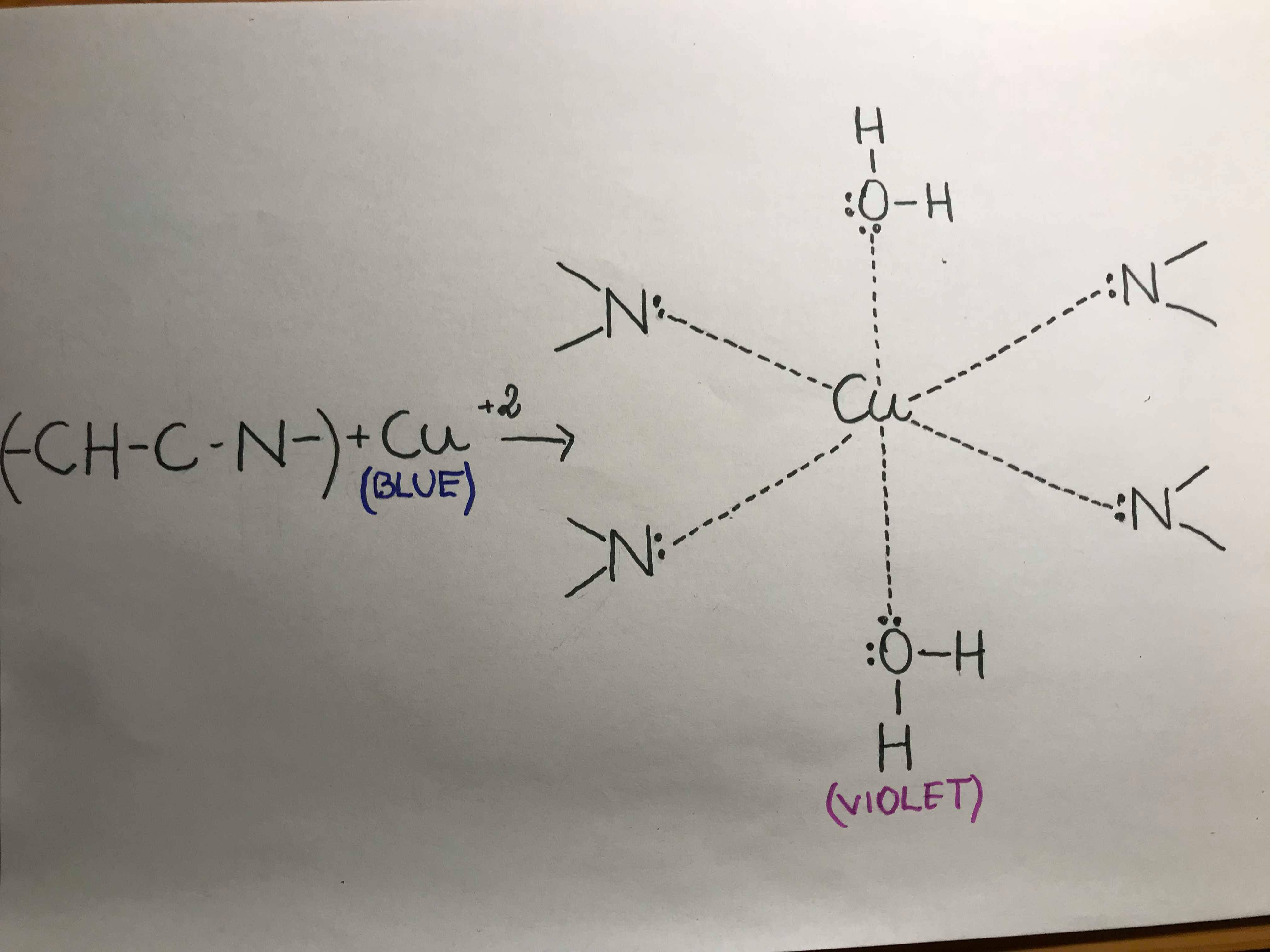 Biureedireaktsiooni võrrand